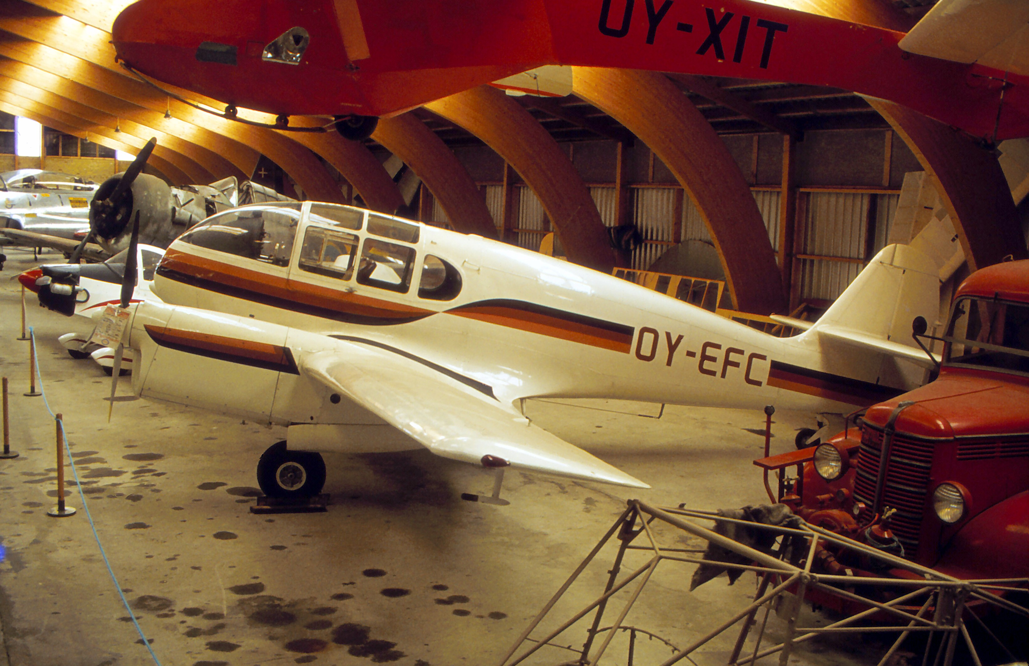 OY-EFC C.Z.A.L. Super Aero 45 c/n 03-007 build 1956 seen at stauning airfield Danmark ( Dansk Veteranflysamling) july 10 1983